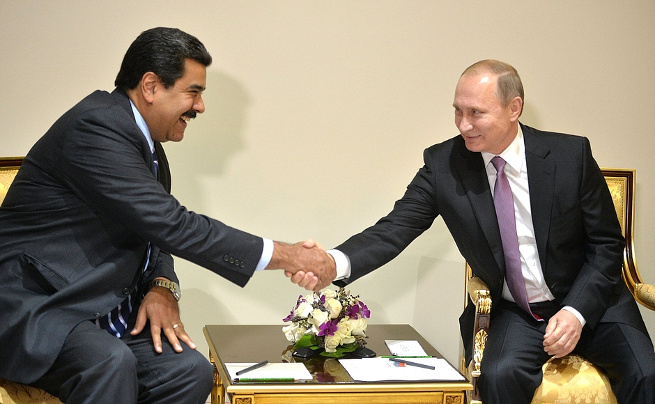 Владимир Путин и Николас Мадуро